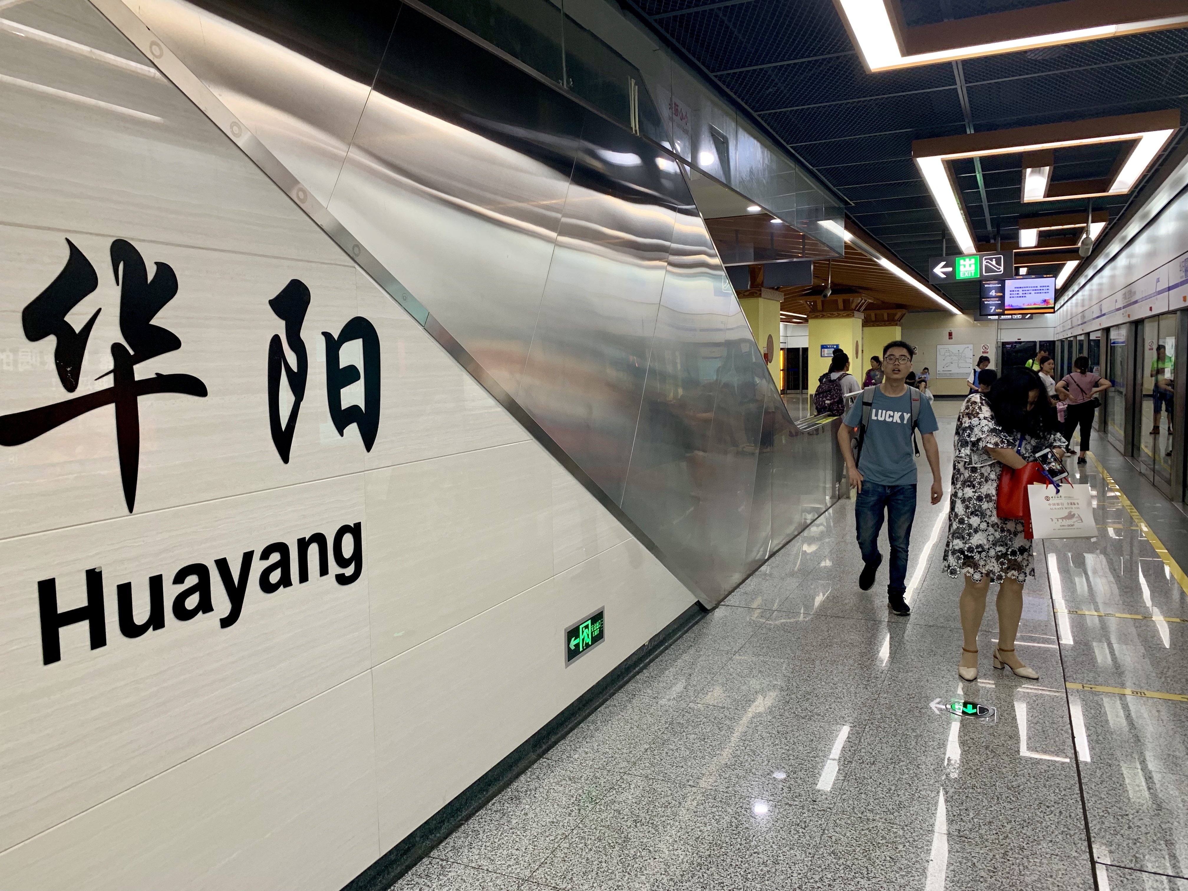 成都地铁华阳站